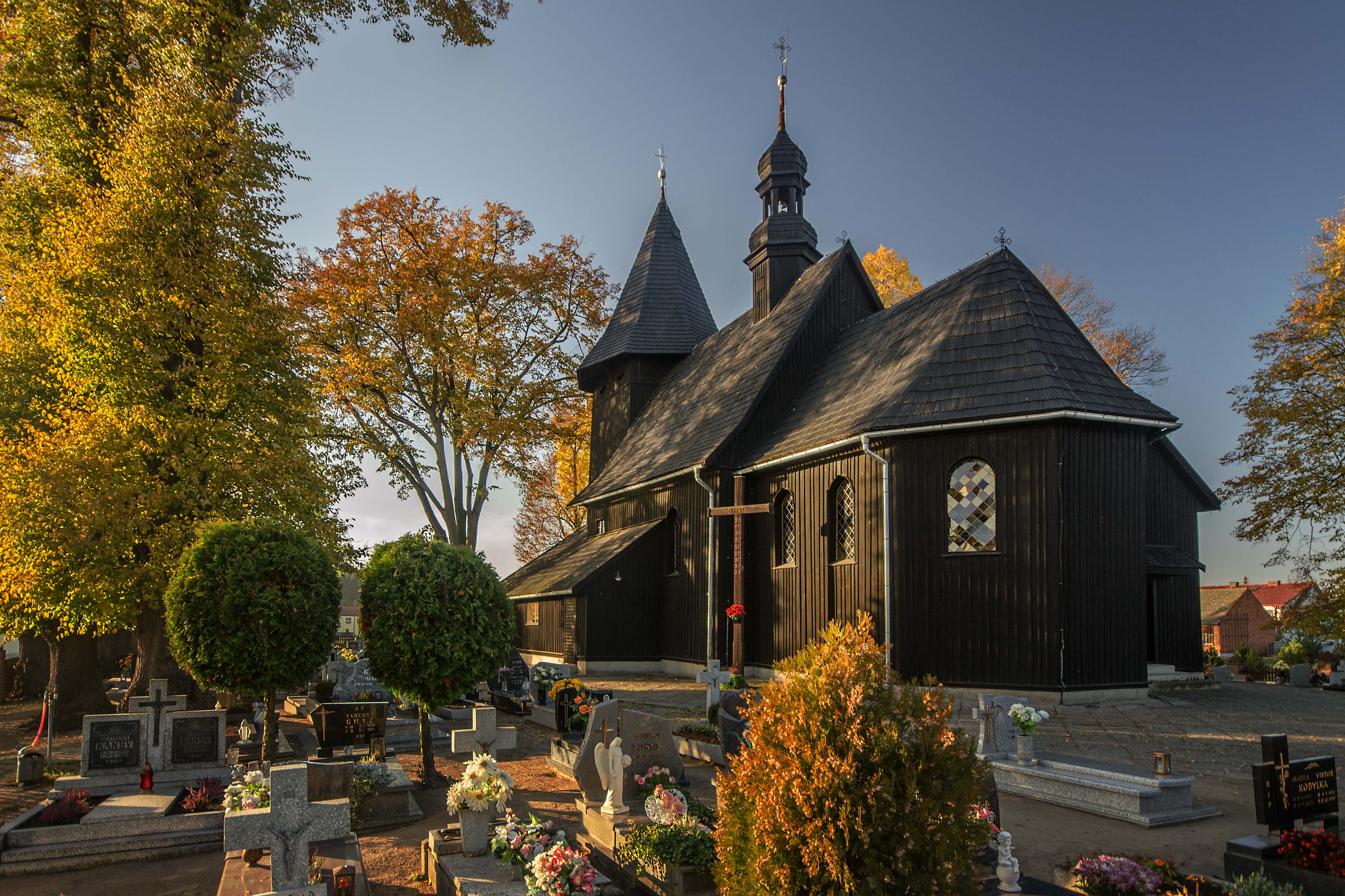 Laskowice, kościół fil. p.w. św. Wawrzyńca, 1689, 1856